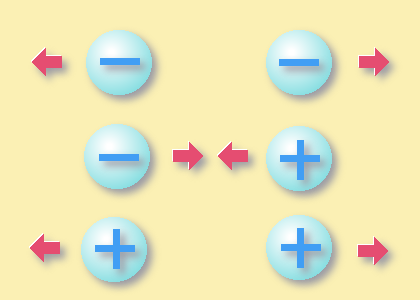 Interacción de cargas eléctricas